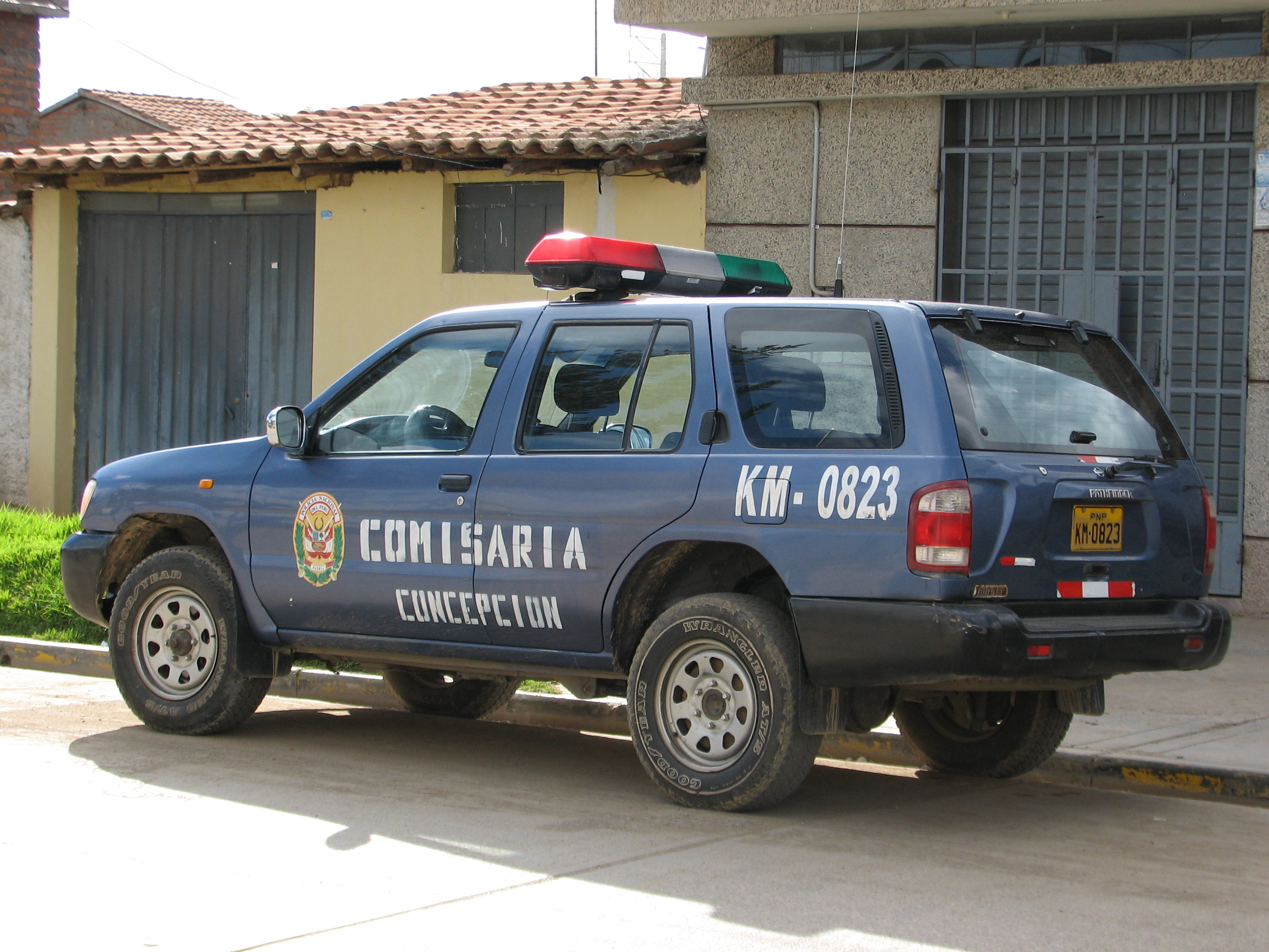 Police car, Nissan Pathfinder in Concepción, Concepción/Concepción/Junín, Peru